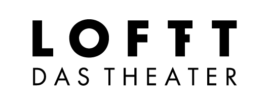 Neues LOFFT-Logo ab 2013